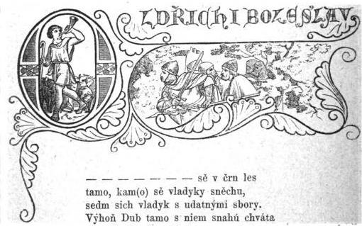 Illustration of Oldřich i Boleslav, a poem included in Rukopis královédvorský (Manuscript of Dvůr Králové nad Labem, a forged middle-age book of poetry)